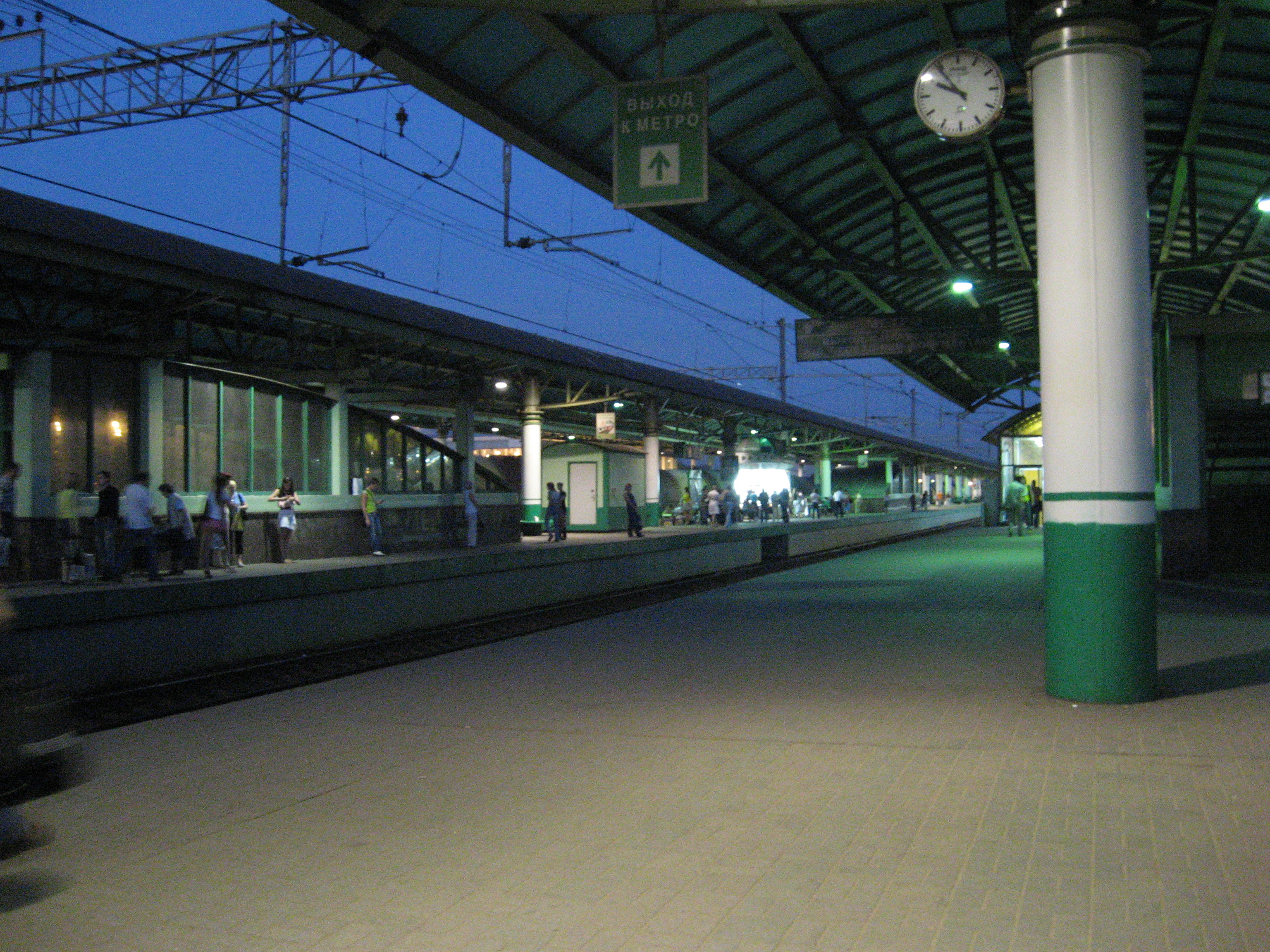 Ж/Д станция Выхино / Vikhino railway station